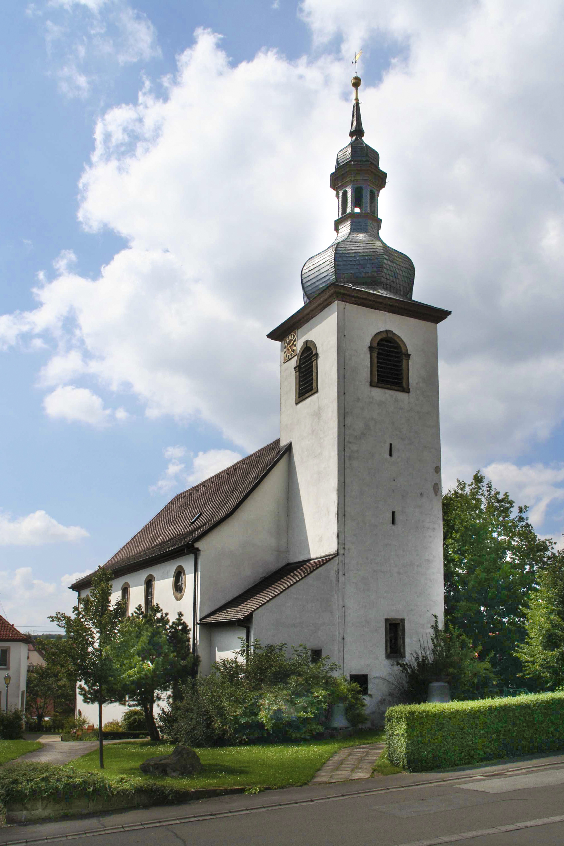 Ev. Kirche Ermershausen im Landkreis Haßberge in Bayern